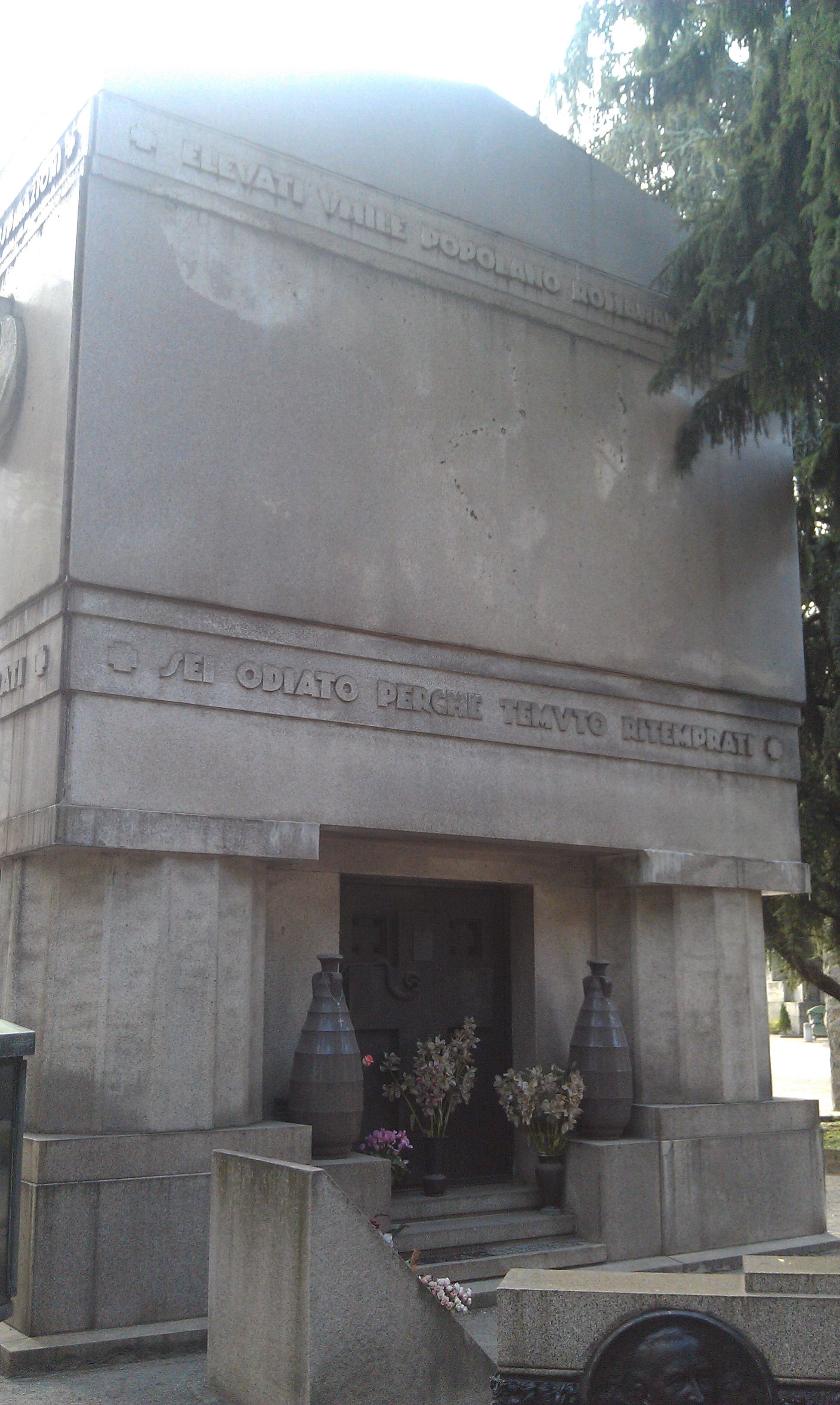 Mausoleo Civico Palanti - Sei odiato perché temuto, ritemprati - Elevati umile popolano